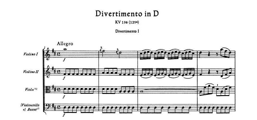 Mozart K.136の第1楽章冒頭部